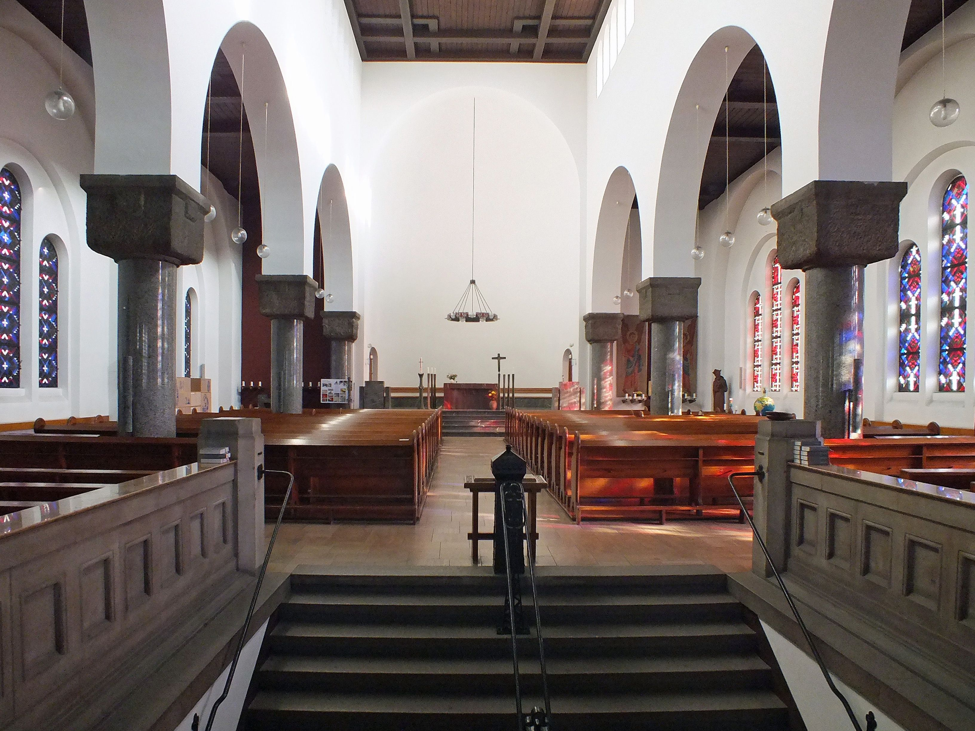 Aufgang und Schiff der Liebfrauenkirche Leipzig-Lindenau